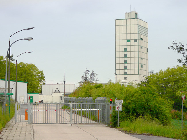 Schacht Bartensleben, Endlager Morsleben in Morsleben (seit 2010 ein Ortsteil von Ingersleben), Sachsen-Anhalt